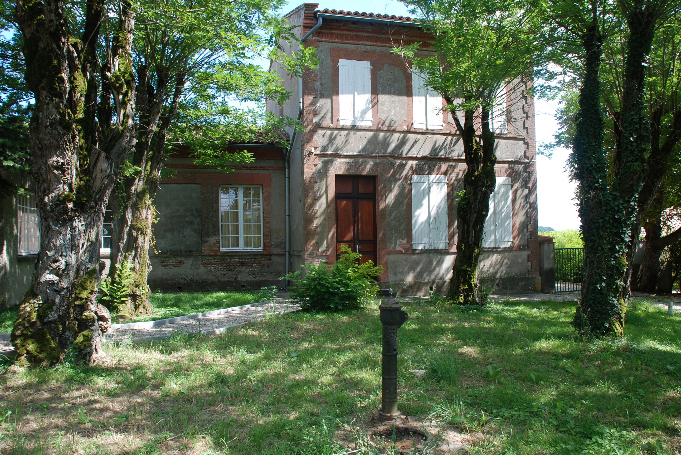 Ancienne école de Vigoulet-Auzil (Haute Garonne), construite en 1908. Elle est attenante à la nouvelle école.